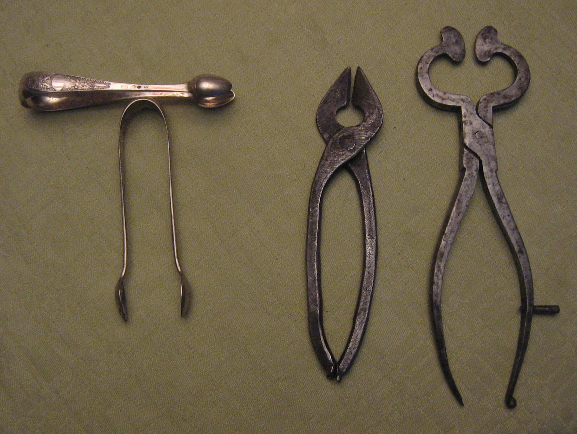 Två sockertångar för tillskärning av toppsocker. Två sockertångar för att ta bitsocker ur sockerskål.